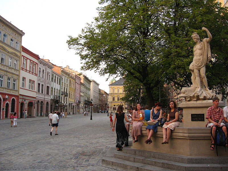 м.Львів, Площа Ринок